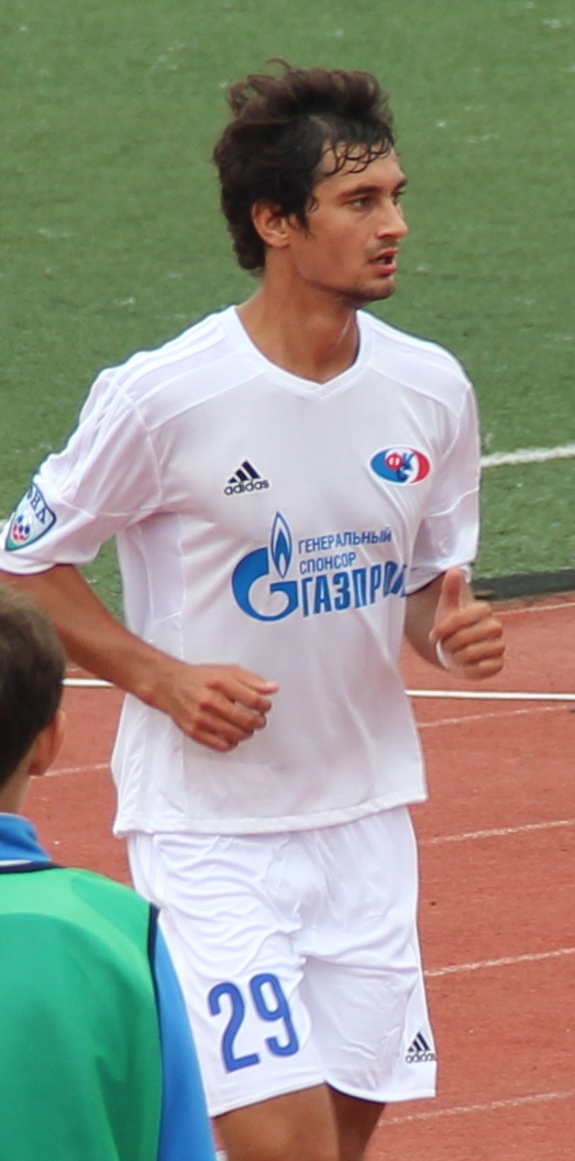 Aleksandr Ilyin